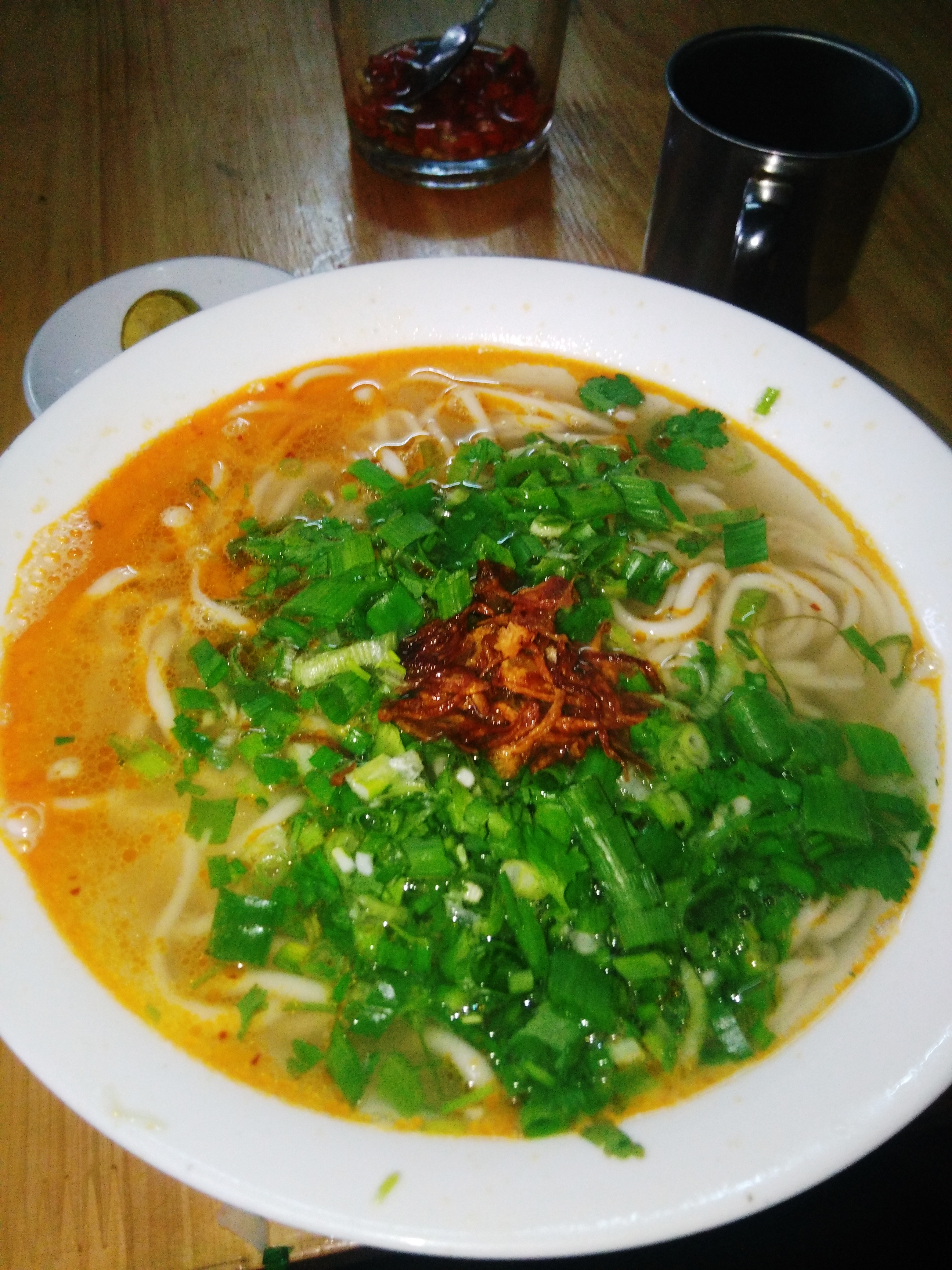 Hình tự chụp bằng máy điện thoại di động cá nhân về một tô cháo cá Đông Hà (bánh canh cá lóc), địa điểm tại quán ăn số 45 Nguyễn Trãi, phường 1, Đông Hà